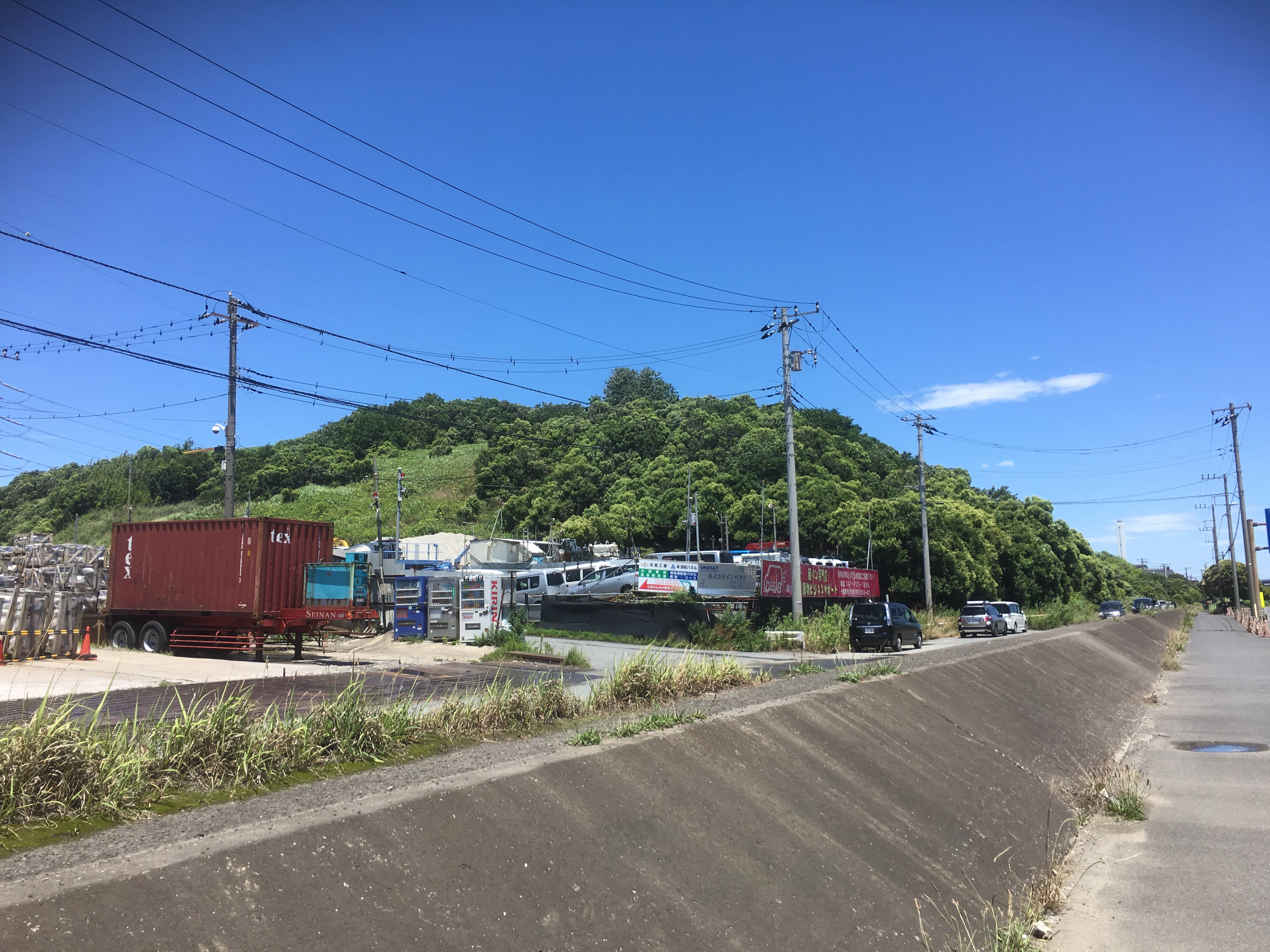 「行徳富士」と俗称される、千葉県市川市本行徳にある違法残土によって形成された地形。植物被覆により自然の山のような景観になっている。